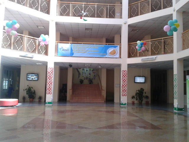 атриумның негізгі көрінісі